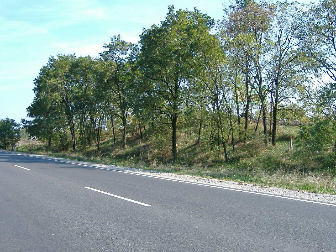 A Nagykerti-halom (kunhalom) maradványa Kisújszállás határában